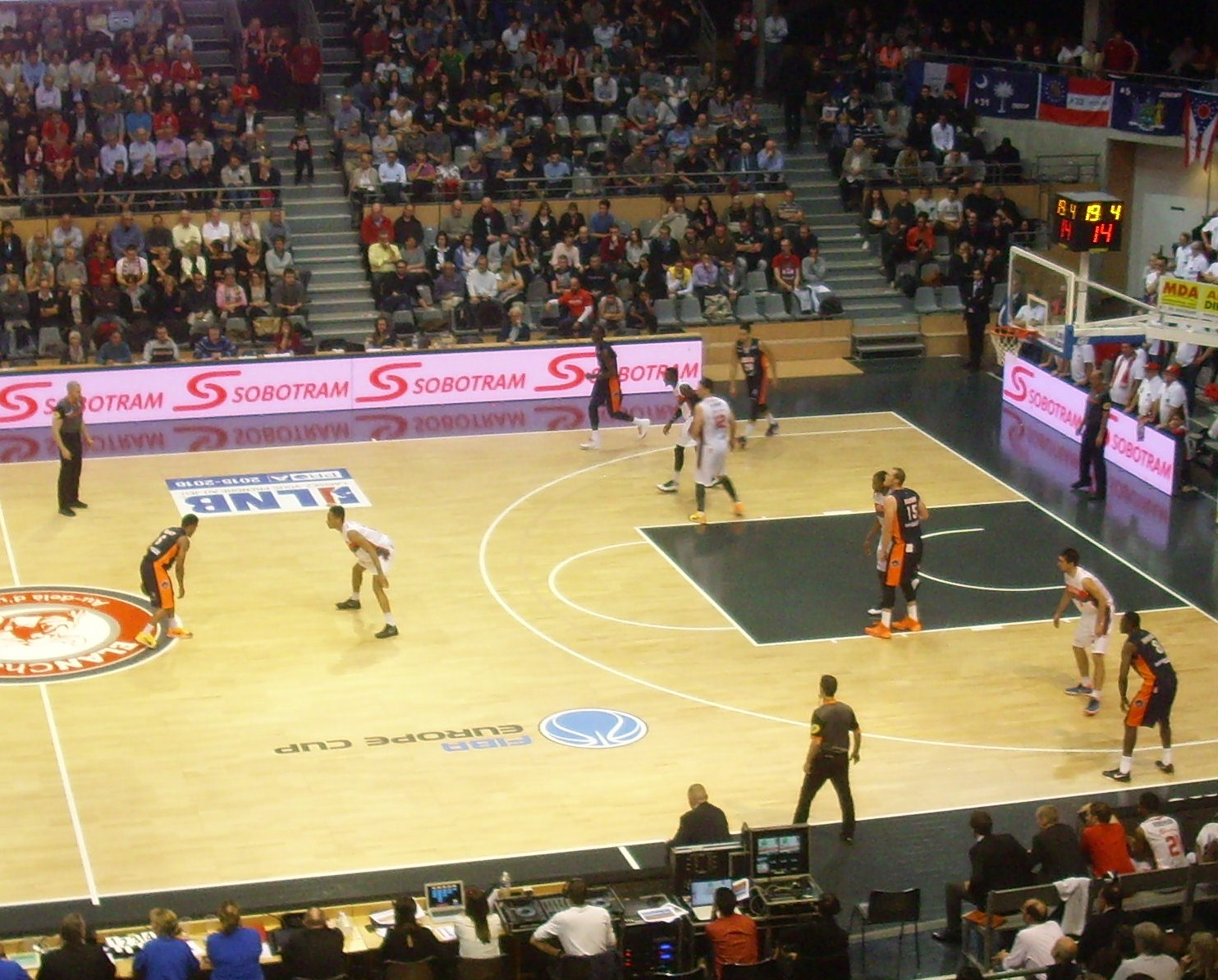 Match de Pro A (2015-2016) entre l'Elan Chalon et Gravelines-Dunkerque au Colisée